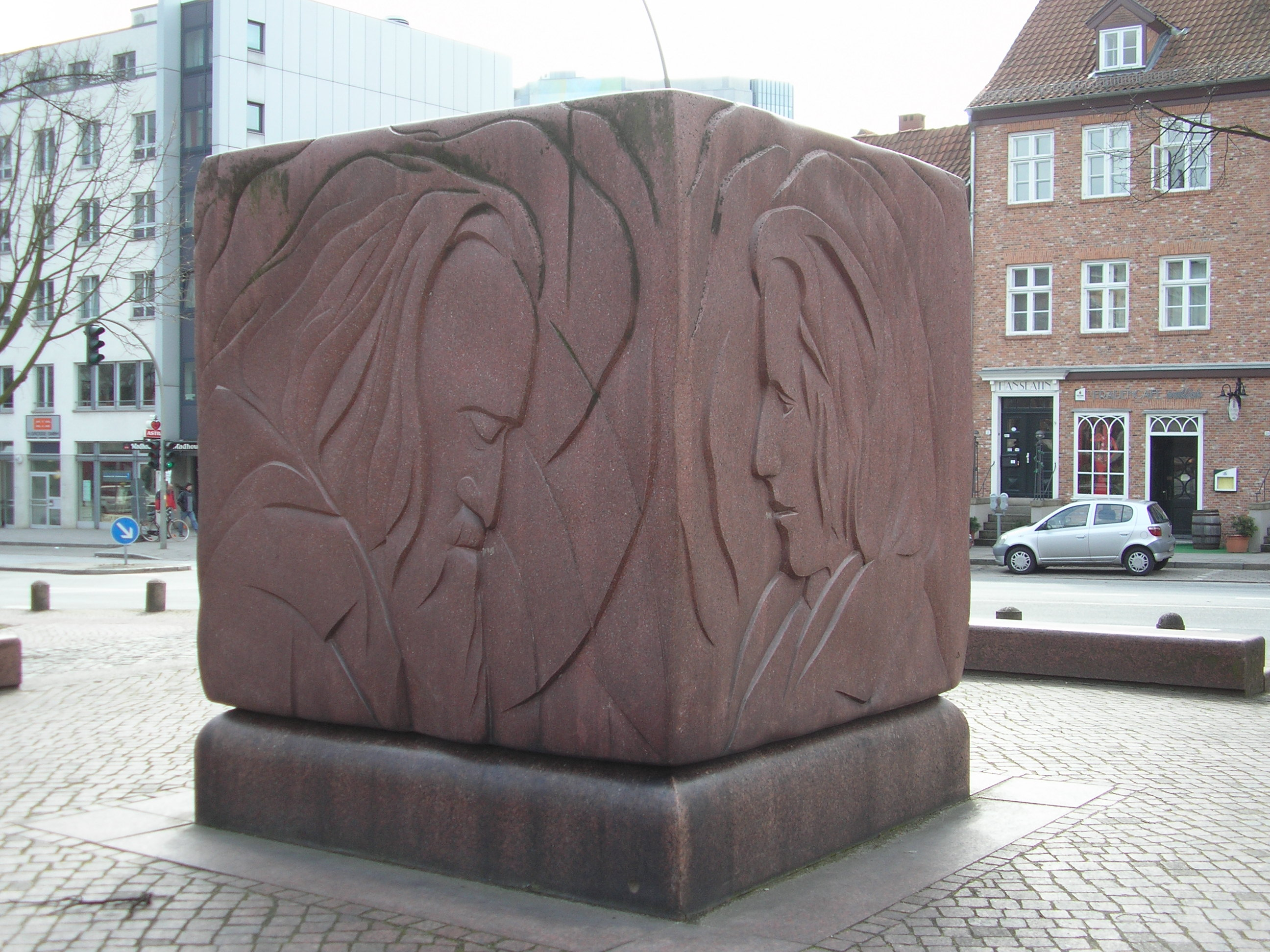 Brahms-Denkmal in Hamburg